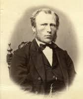 Den norske politikeren og revisjonsministeren Lars Knutson Liestøl (1839-1912)